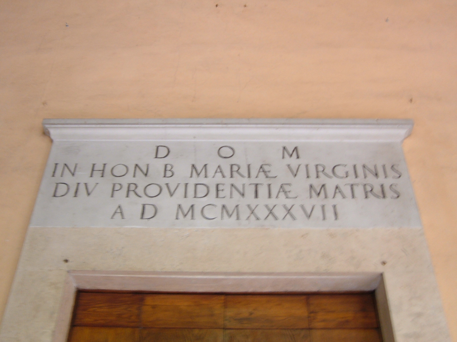 Chiesa di Santa Maria Madre della Provvidenza, a Roma, nel quartiere Gianicolense.